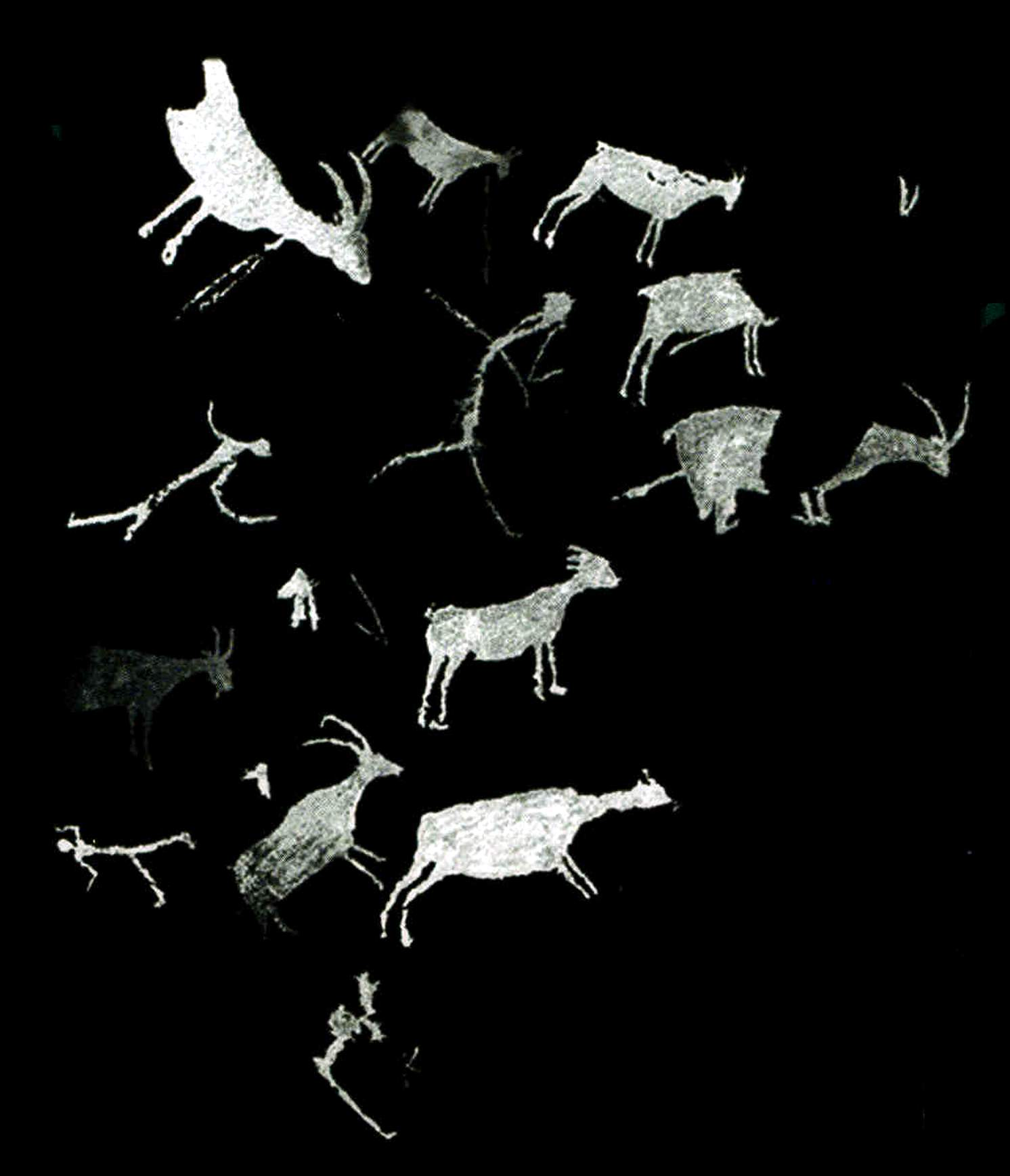 Detalle del panel decorado (en positivo) del abrigo de las Cabras Blancas en Tormón, Parque Cultural de Albarracín (2018).